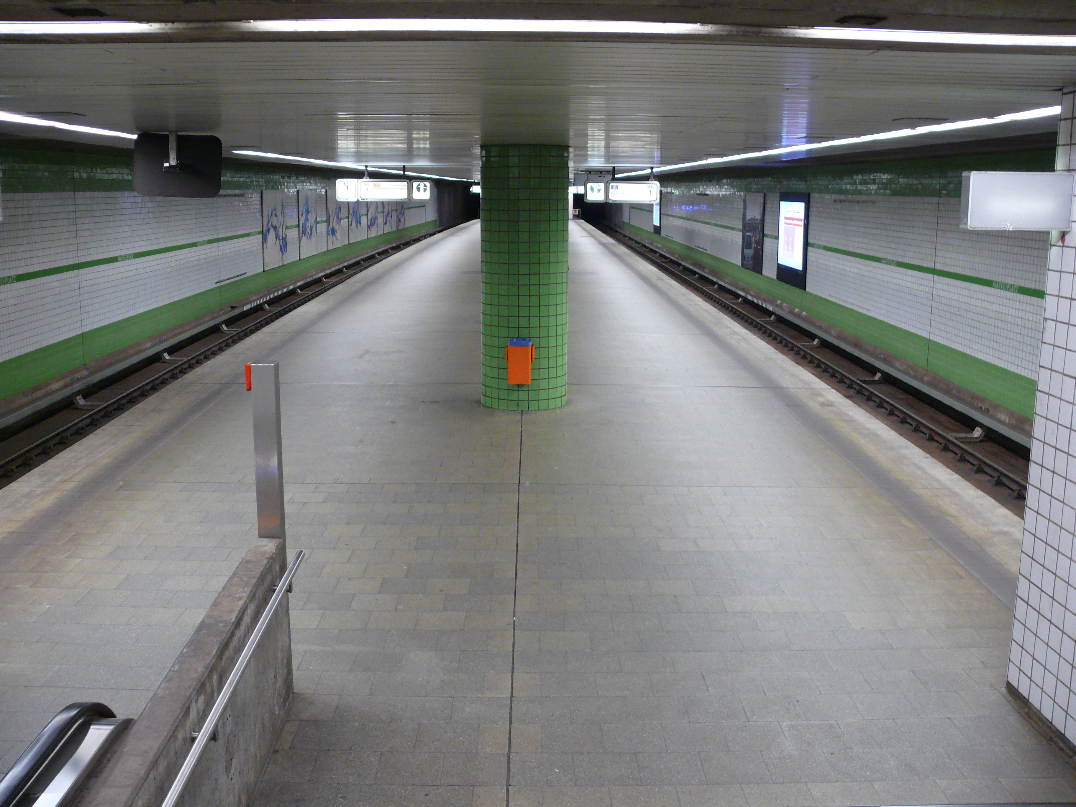 Blick auf die Bahnsteigebene am U-Bahnhof Maffeiplatz in Nürnberg.